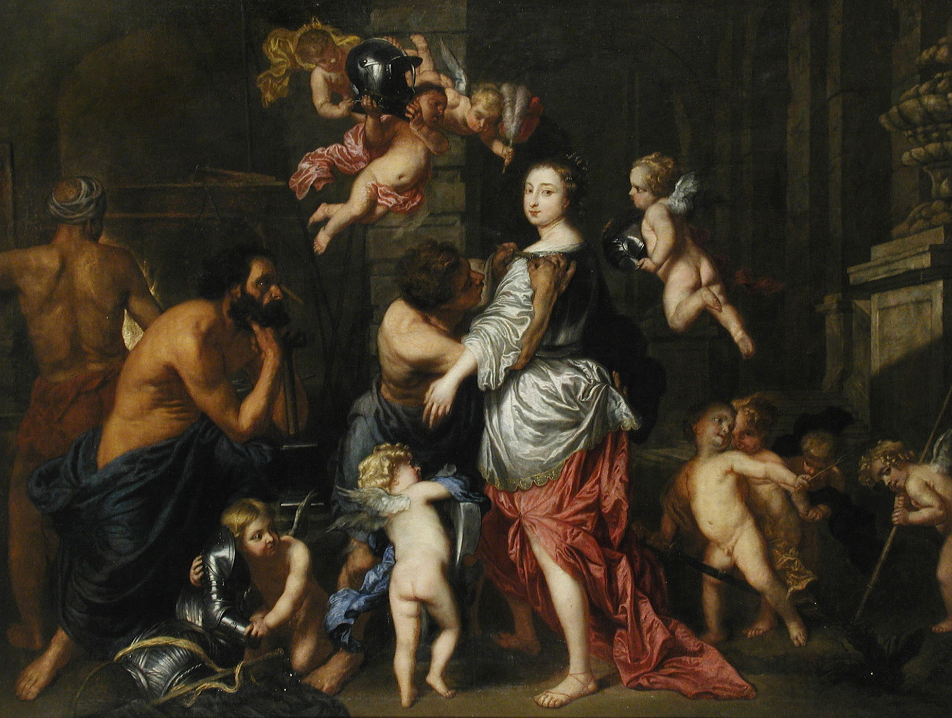 Палатно, алей